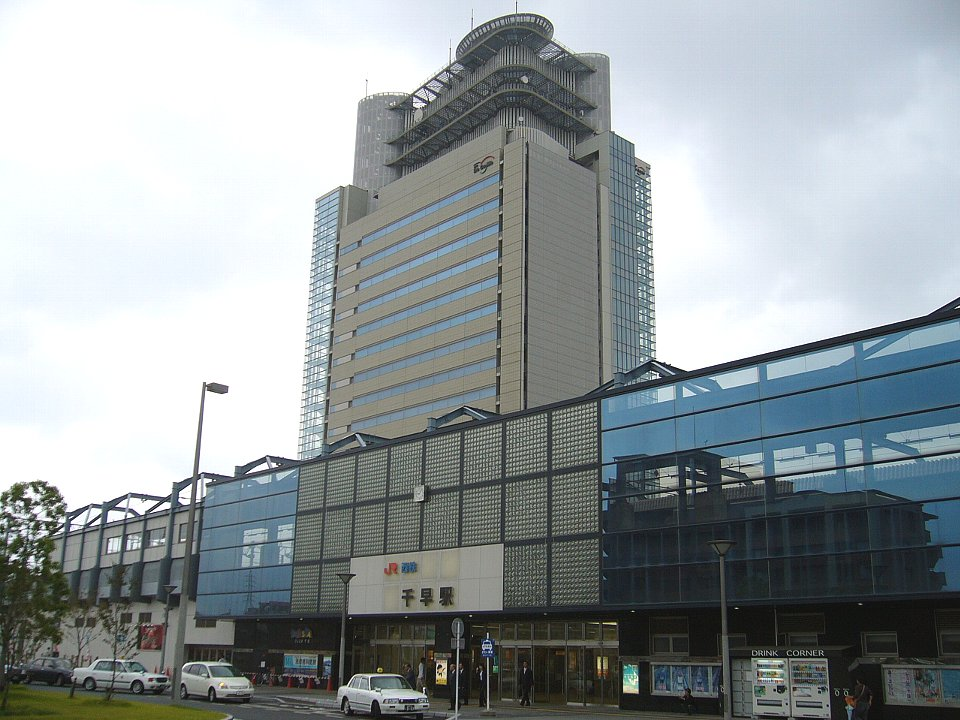 鹿児島本線千早駅 背景はDoCoMo九州福岡新ビル 2006年10月6日 Bakkai撮影